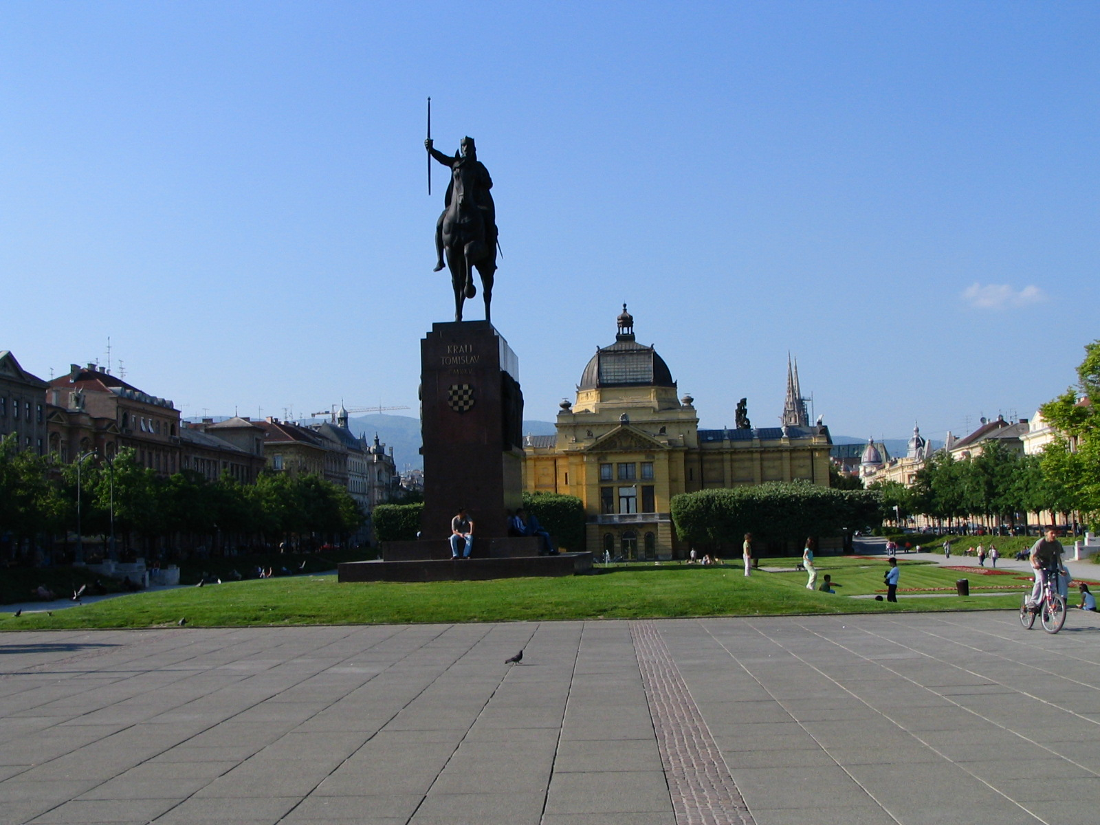 Tomislav Square. Zagreb